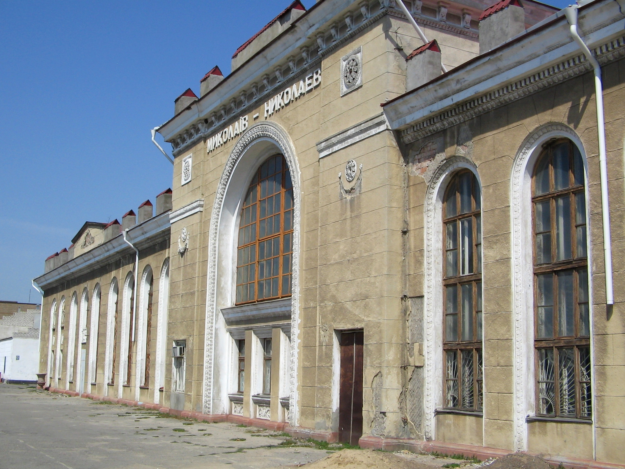 Старый вокзал в Николаеве